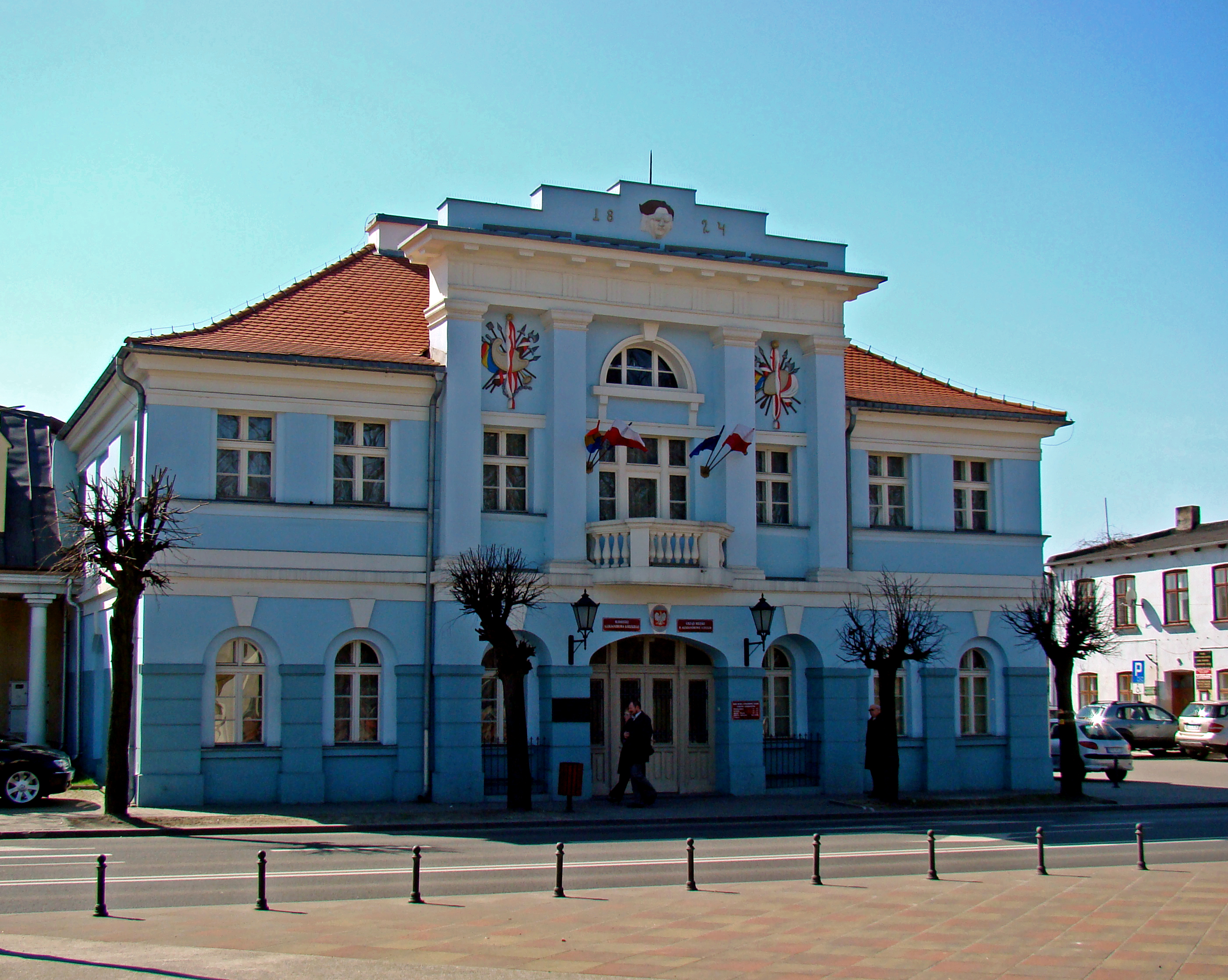 Ratusz Miejski w Aleksandrowie Łódzkim (powiat zgierski, województwo łódzkie), Polska